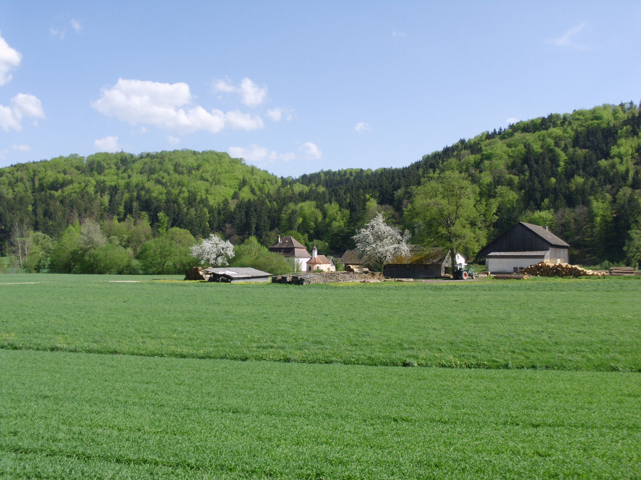 Schafhausermühle, Ortsteil von Kinding im Landkreis Eichstätt